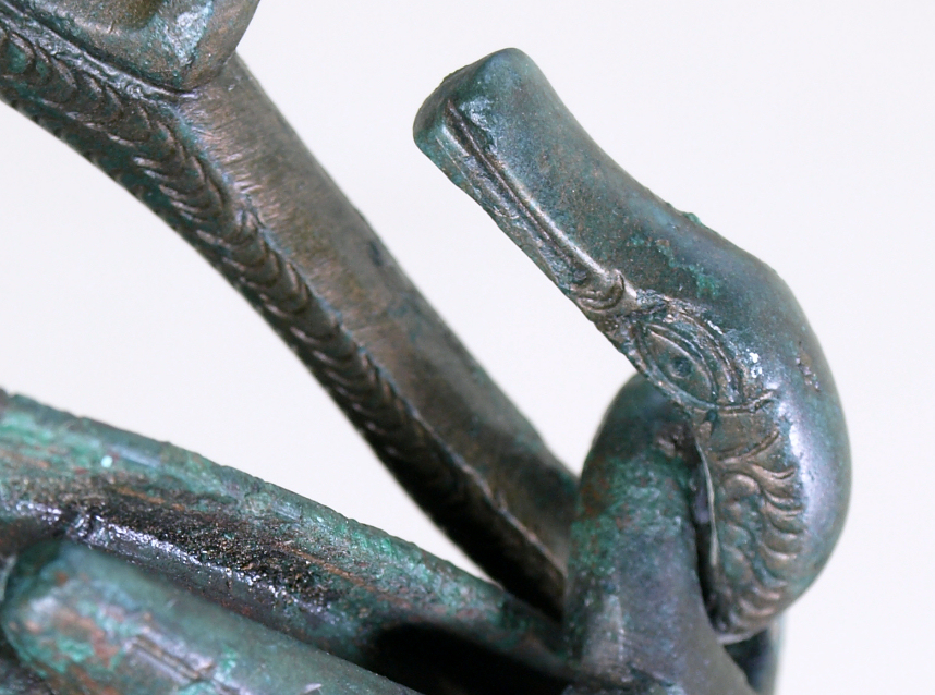 Bronzeeimer von Sasendorf, Henkelenden als Vogelkopf mit Hals ausgebildet